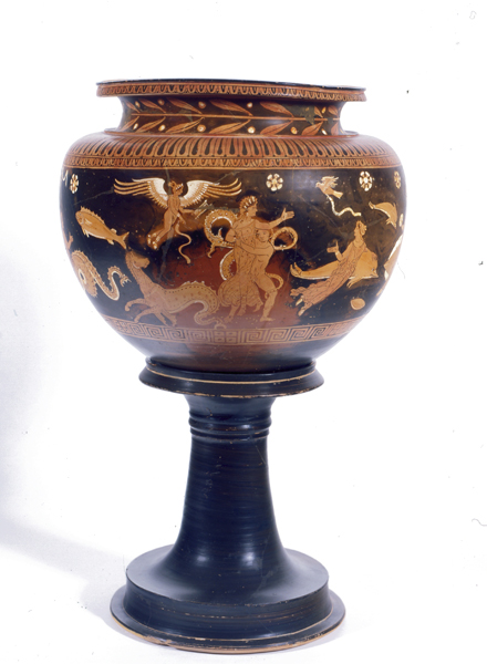 Dinos de Tetis y Peleo (Cultura Griega). Número de inventario: 2001-89-2.